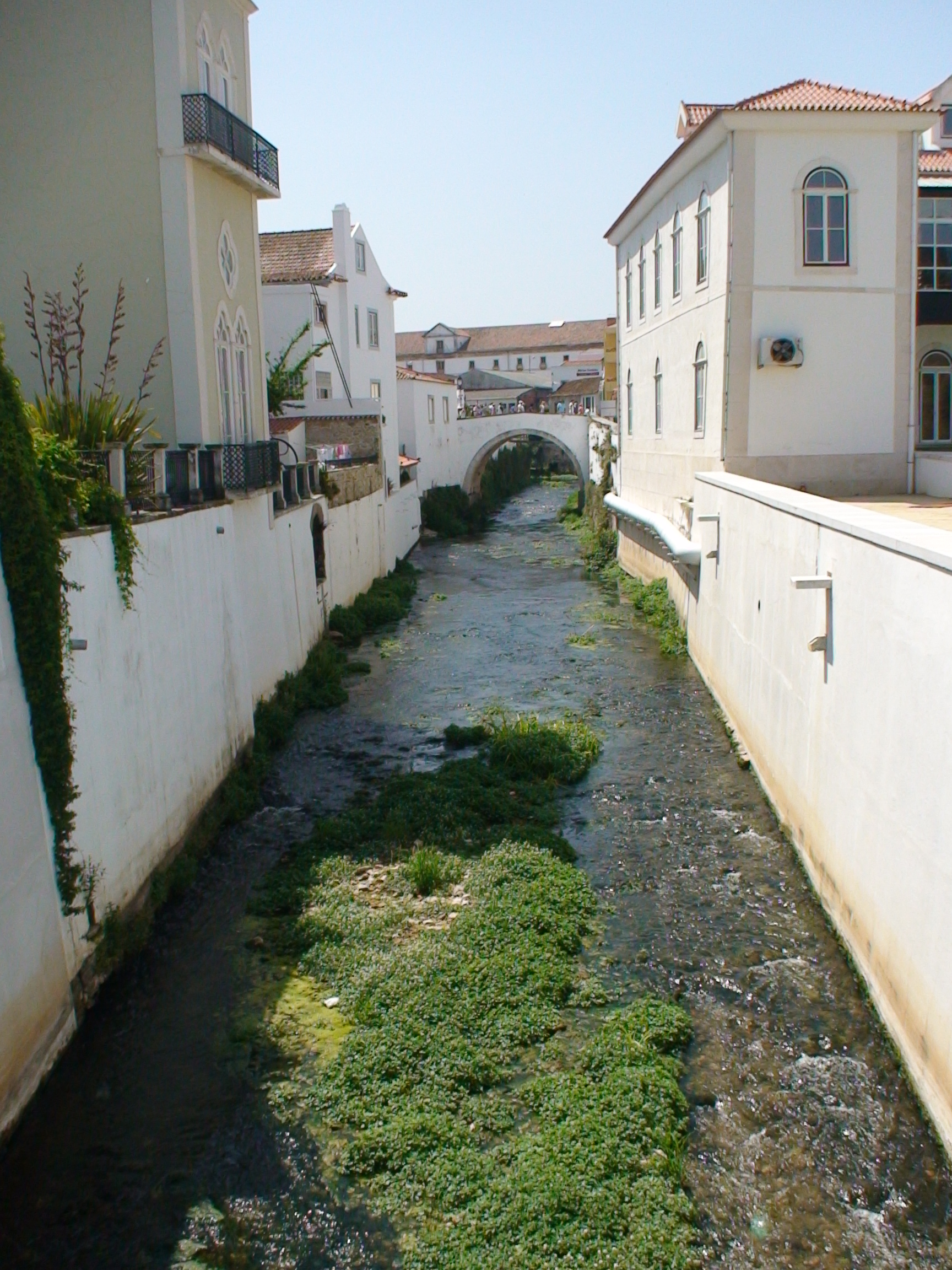 Rio Alcoa em AlcobaÃ§a, perto da Biblioteca Municipal